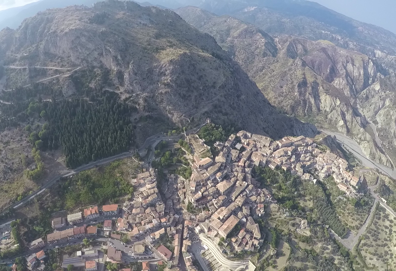 Stilo vecchio dall'alto con Castello 2016